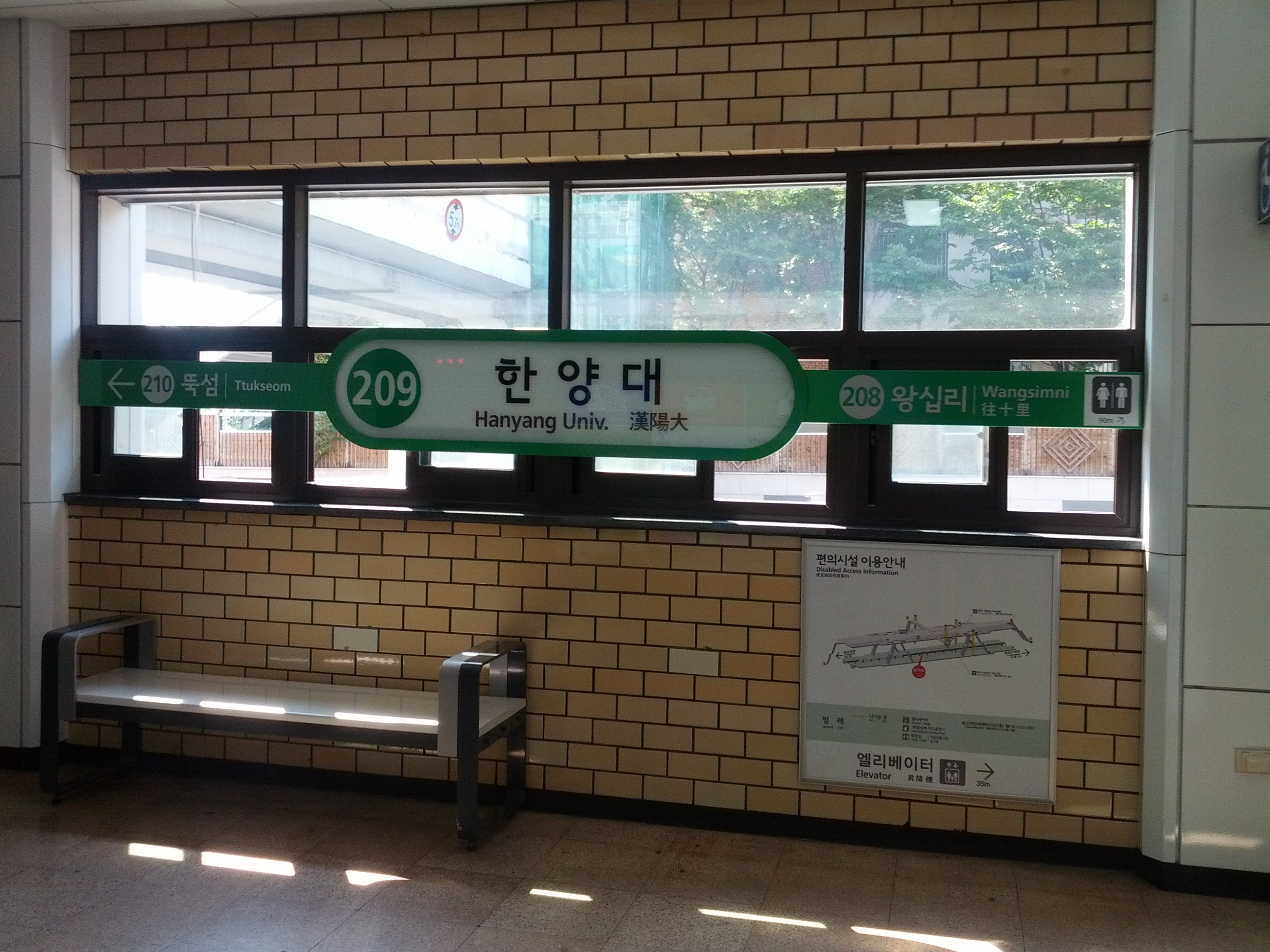 한양대역 내선순환 역명판